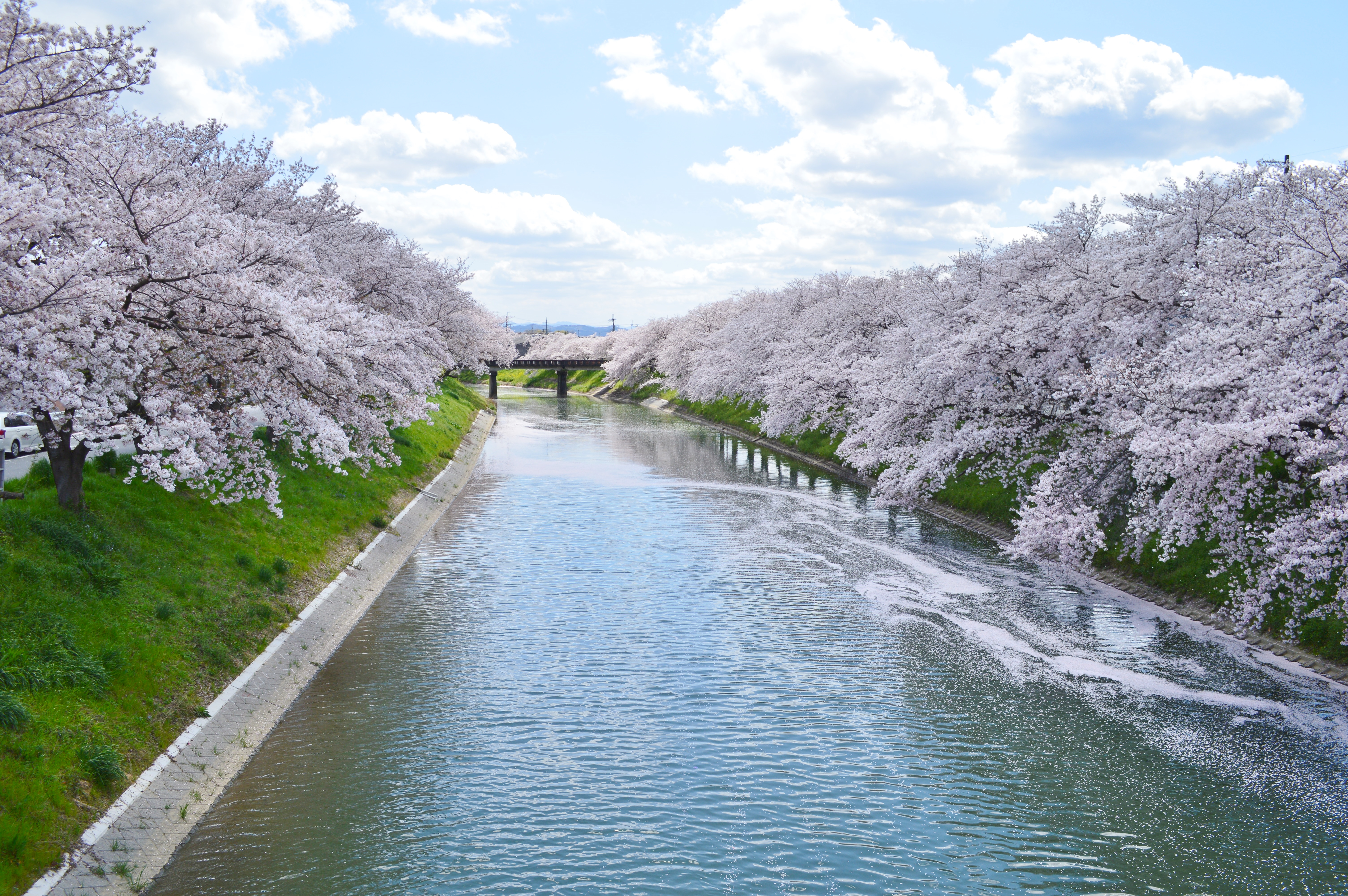 曽我川 (橿原市東坊城町付近)